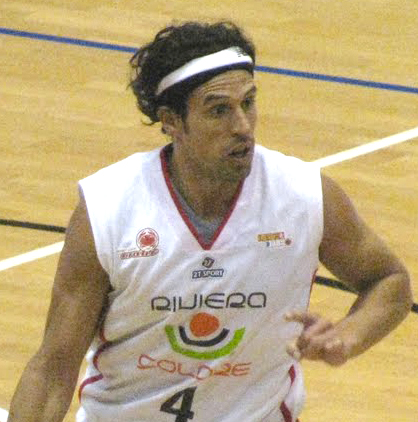 German Scarone, giocatore dei Crabs Rimini